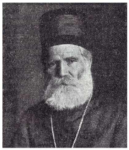 Митрополит дабробосански Петар Зимоњић